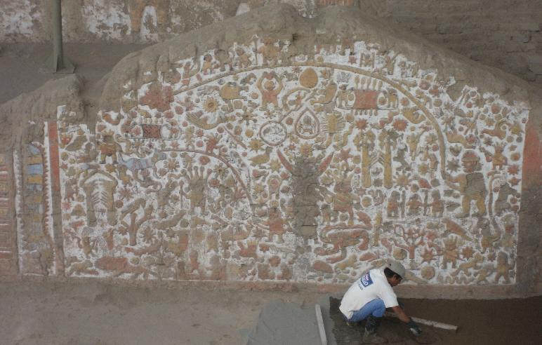 Mochica mythology in the "huaca de la Luna". La Libertad, Peru.